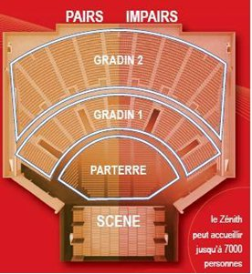 plan de configuration du Zénith de Dijon